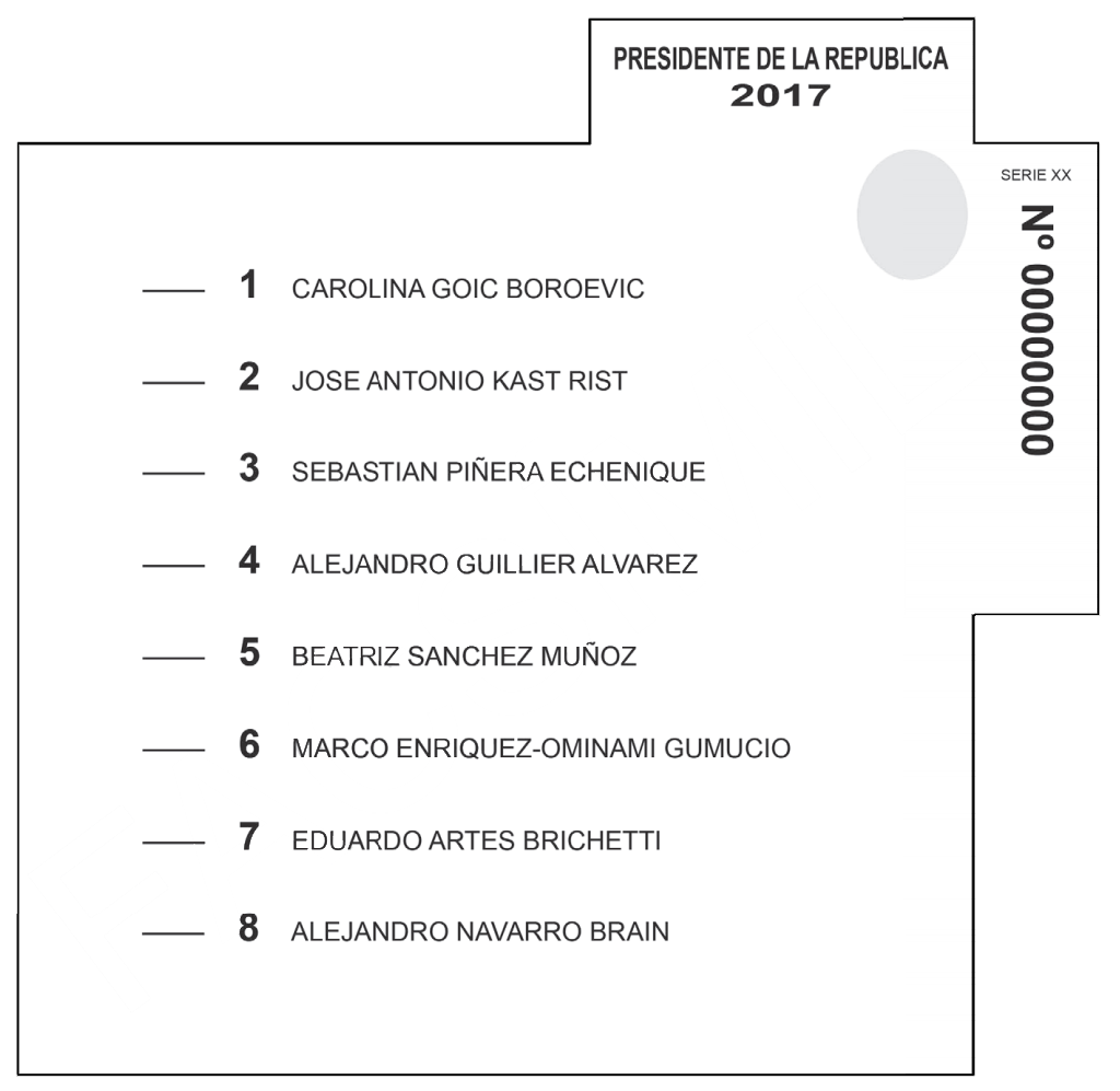 Reproducción de la cédula de votación utilizada en la elección presidencial de Chile de 2017.